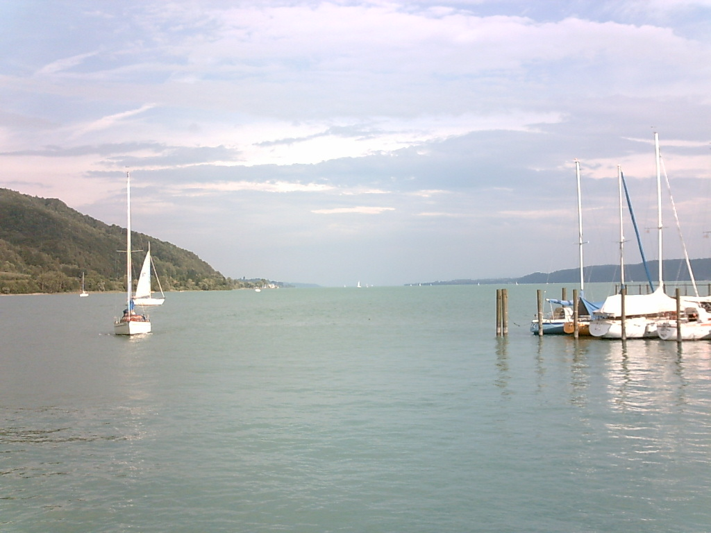 Blick auf den Bodensee von Bodman-Ludwigshafen, selbst fotografiert, 2005